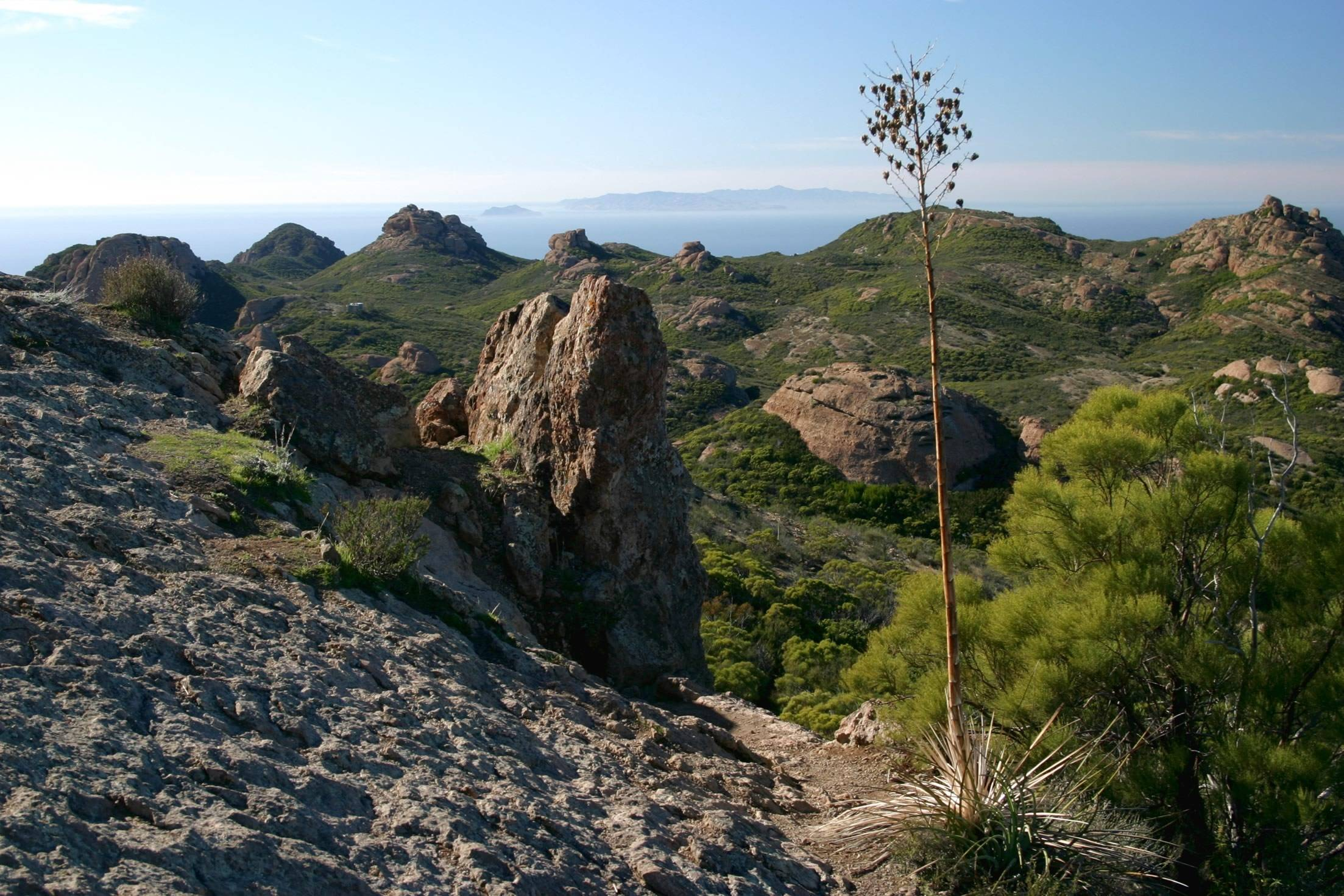 Santa Monica NRA